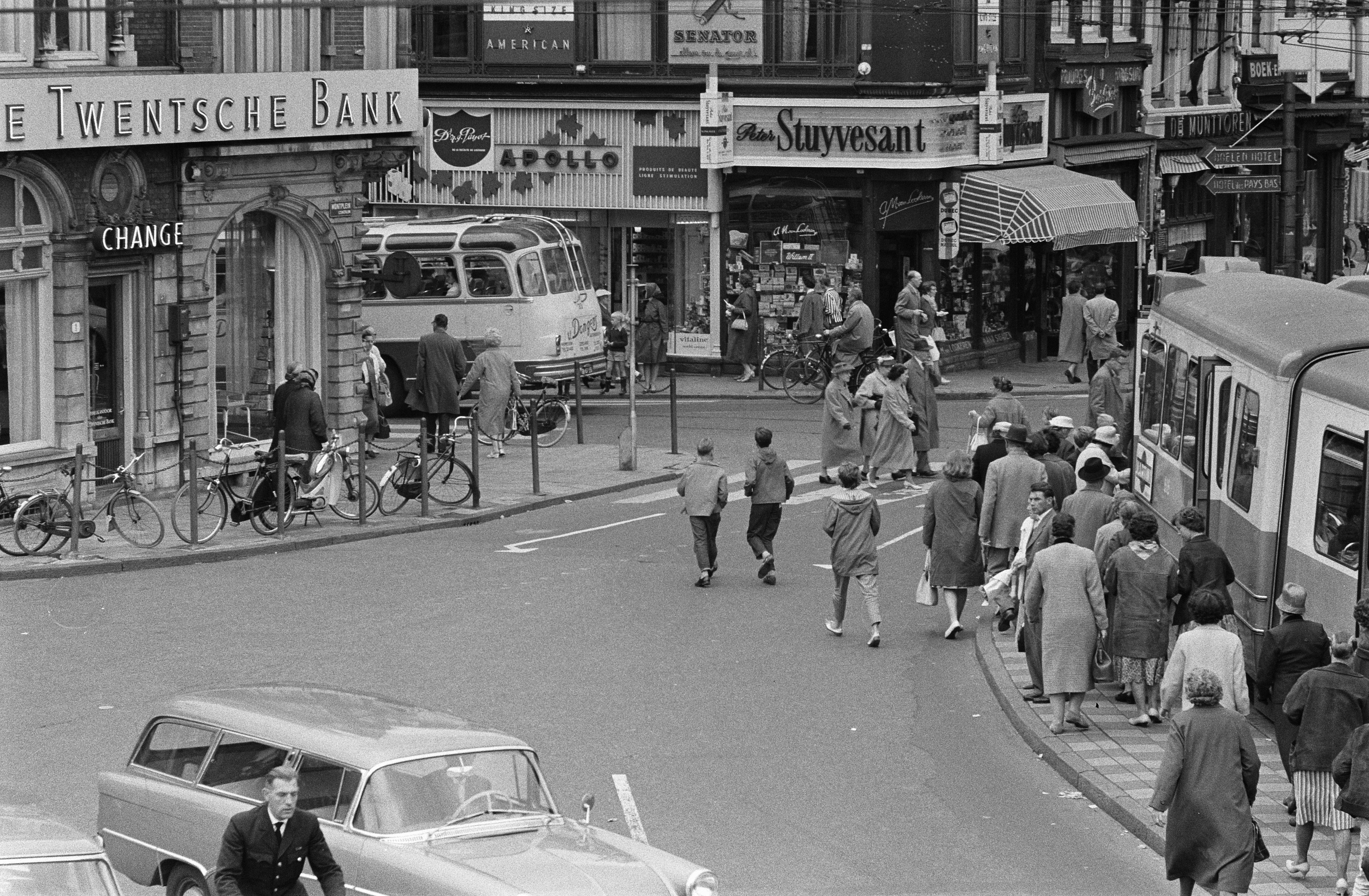 Collectie / Archief : Fotocollectie Anefo Reportage / Serie : [ onbekend ] Beschrijving : Voetgangers in Amsterdam lopen naar de zebrapaden Datum : 31 augustus 1960 Locatie : Amsterdam, Noord-Holland Trefwoorden : VOETGANGERS, ZEBRAS Fotograaf : Rossem, Wim van / Anefo Auteursrechthebbende : Nationaal Archief Materiaalsoort : Negatief (zwart/wit) Nummer archiefinventaris : bekijk toegang 2.24.01.05 Bestanddeelnummer : 911-5515